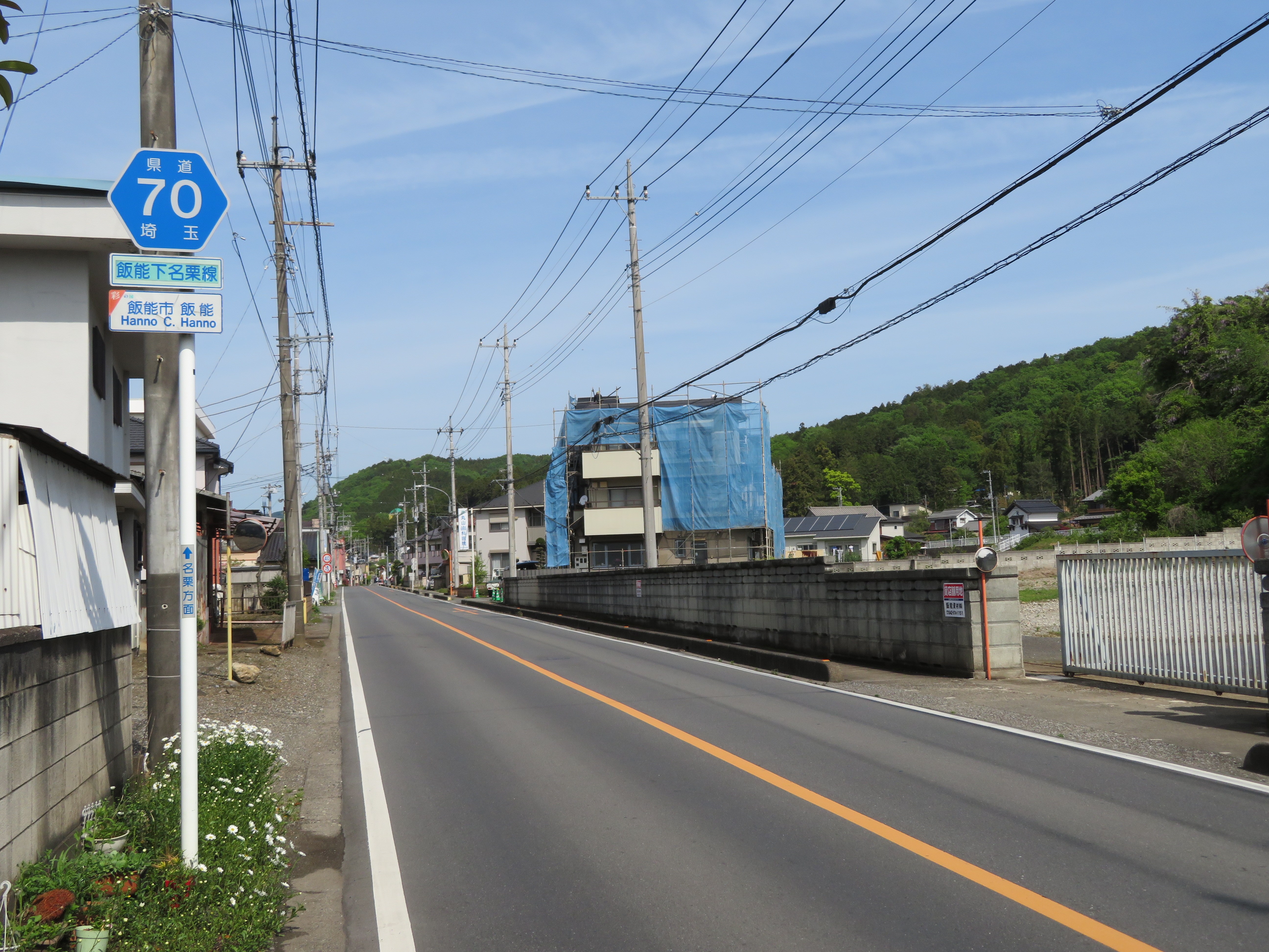 埼玉県道70号線飯能市飯能付近（名栗方面を撮影） Canon PowerShot SX720 HS